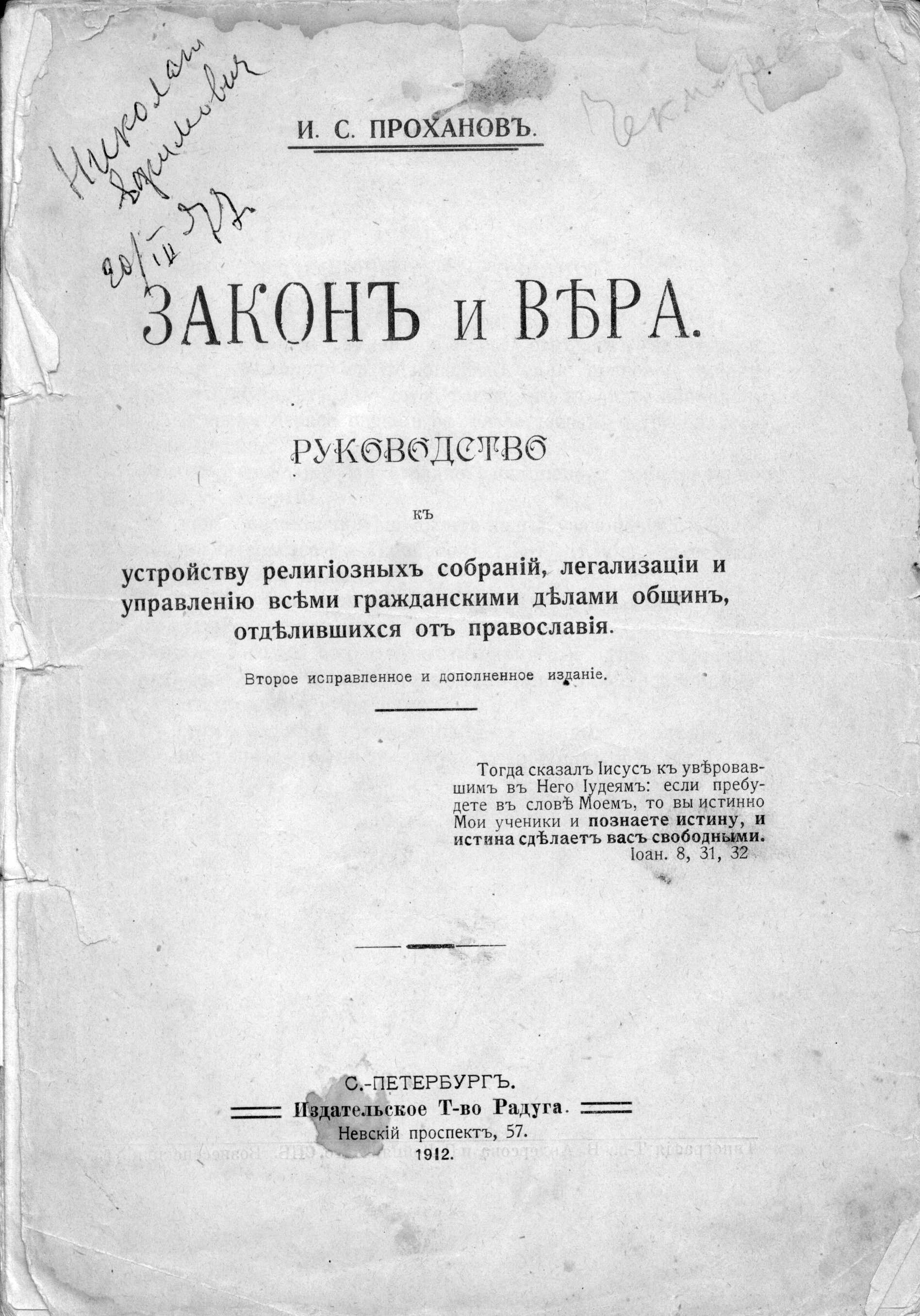 Обложка брошюры И. С. Проханова "Закон и вера", 1912 год, издательство "Радуга", СПб.